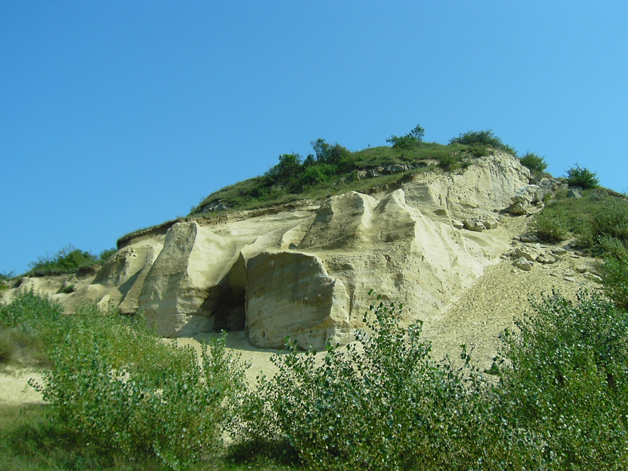 Sandberg, Devínska Nová Ves, Bratislava, Slovakia